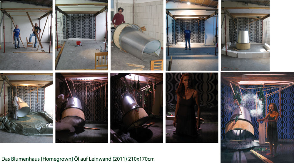 Das Gemälde Blumenhaus [Homegrown] des Leipziger Malers Aris Kalaizis